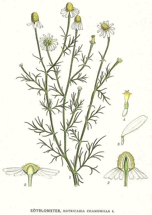 Matricaria recutita L., syn. Matricaria chamomilla L. Original Description Sötblomster, Matricaria chamomilla L.